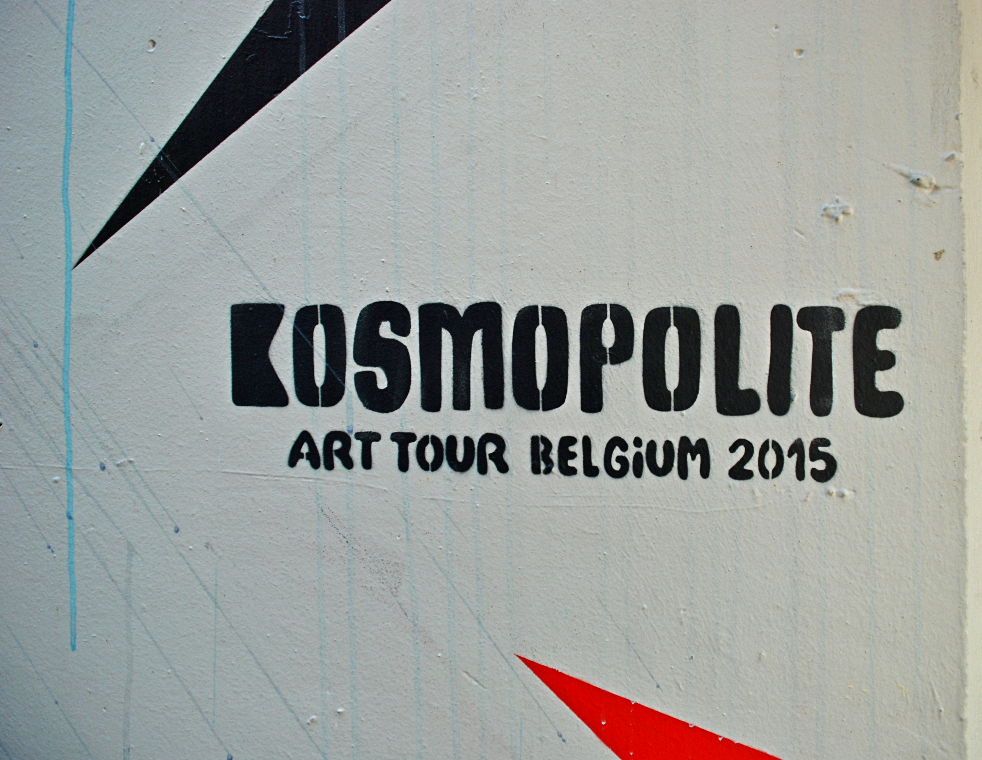 Belgique - Louvain-la-Neuve - Théâtre Jean Vilar - fresque du graffeur français Damien-Paul Gal(Kosmopolite Art Tour 2015)